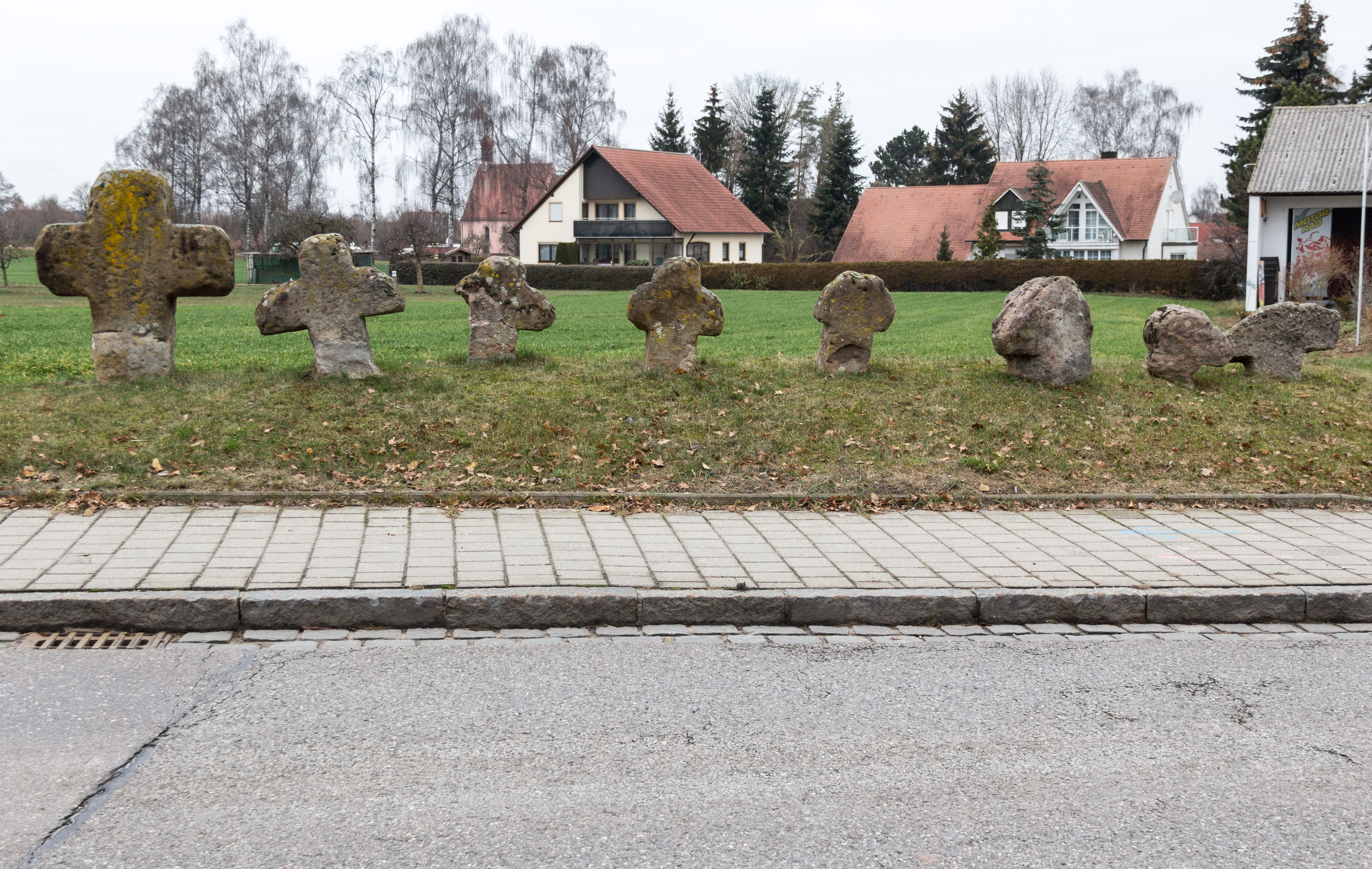 Steinkreuz, Wolframs-Eschenbach, Gruppe